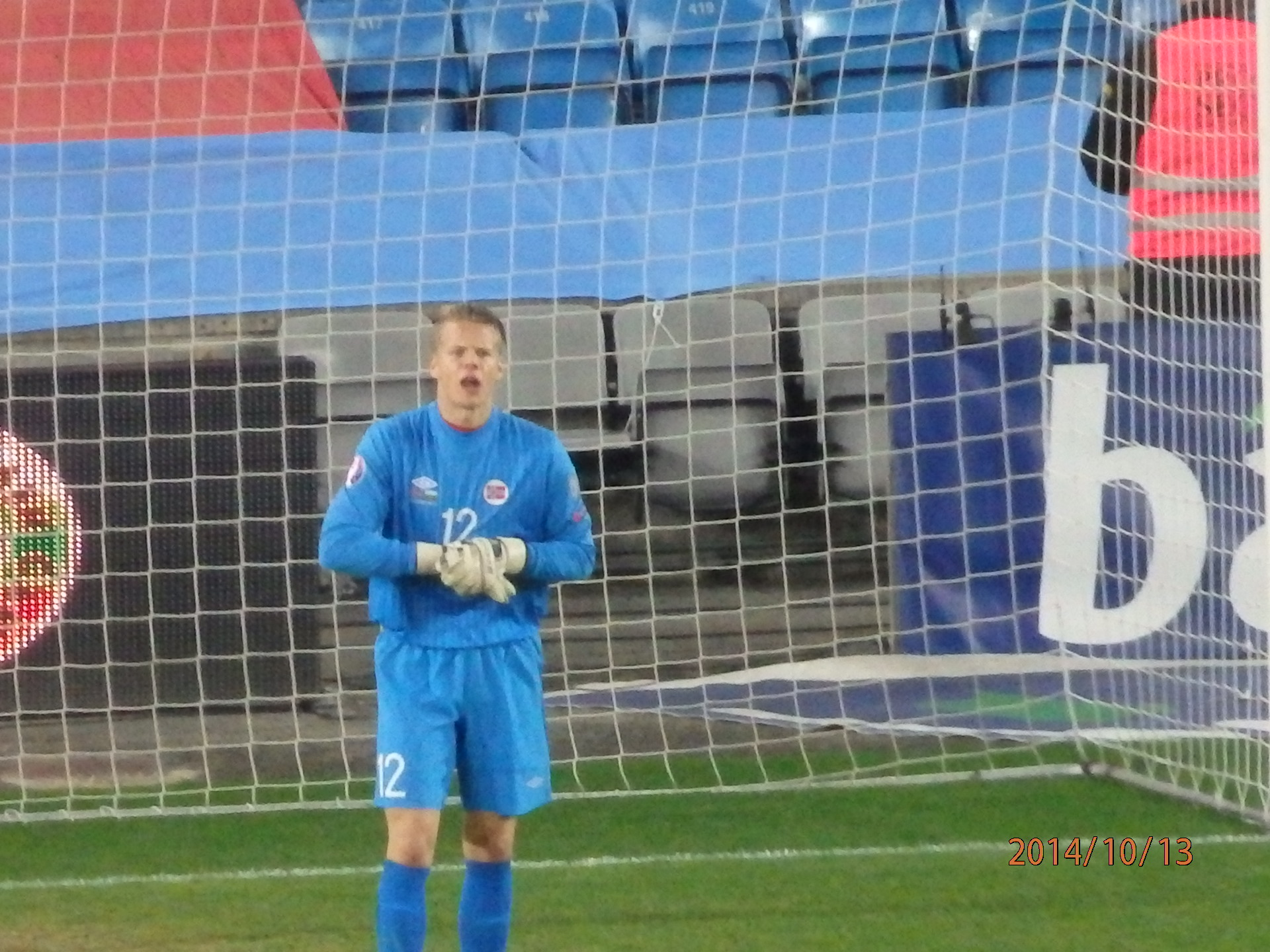 Ørjan Håskjold Nyland